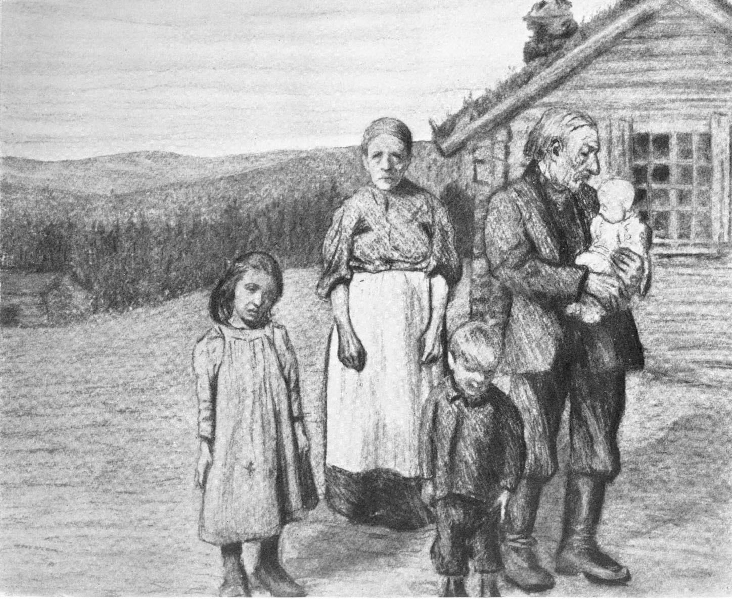 Torpare. Kolteckning. Den värmländska naturen med dess rikt skiftande folkliv, vilket inom litteraturen blivit så omdiktat och besjunget, har i mycket ringa mån varit föremål för målares pensel. Ovannämnde alltför tidigt bortgångne konstnär framställer här en torparefamilj från Fernebo fattigaste och mest isolerade skogsbygd. Ensligheten och den hårda kampen för tillvaron ha givit människorna en prägel av tungsinthet, och bland barnen finner man ofta brådmogna utseenden. Stugan i bakgrunden är en troget återgiven gammal finnstuga. Denna bygd liksom stora delar av Värmland har saknat betingelser för danandet av några bestämda sockendräkter. Från Älvdals, Jösse och Nordmarks härader äro dock kända mycket vackra folkdräkter, men från dessa trakter har tyvärr ej någon av oss känd konstnär sökt sig motiv. - Gerda Cederblom.